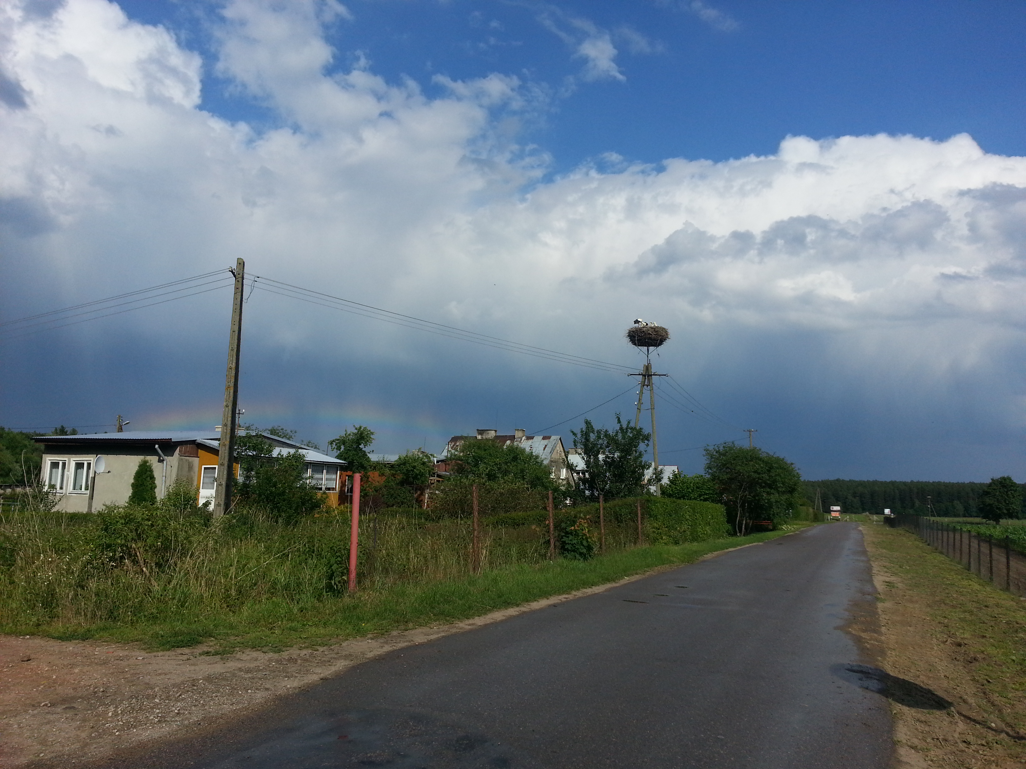 Bałdy - bocianie gniazdo